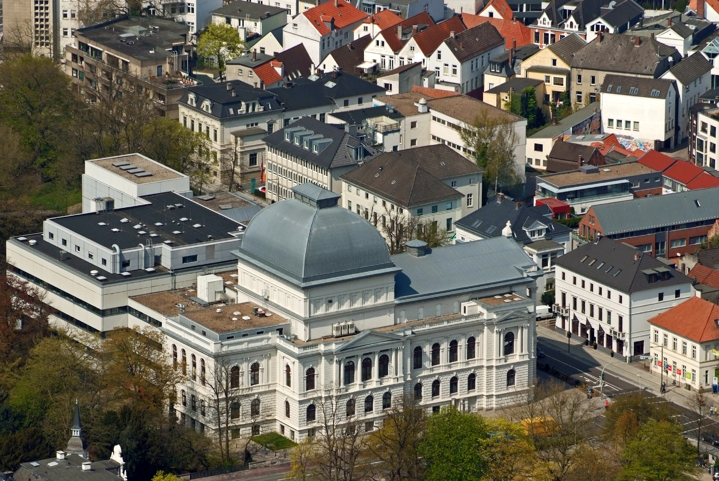 Oldenburgisches Staatstheater / Fotoflug von Nordholz-Spieka nach Oldenburg und Papenburg